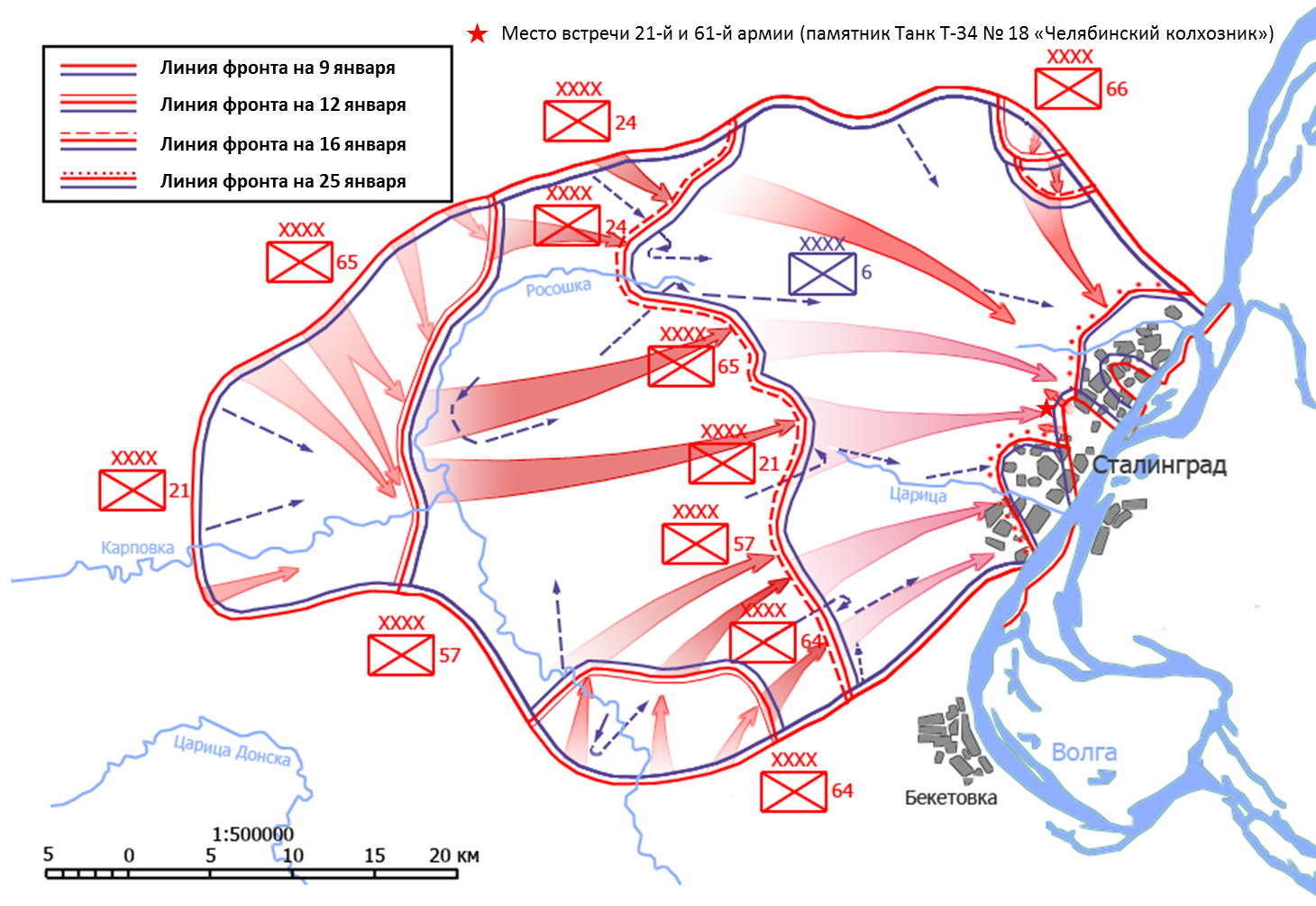 Карта операции «Кольцо»